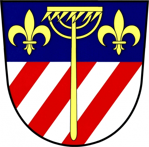 znak, Kosořín, okres Ústí nad Orlicí